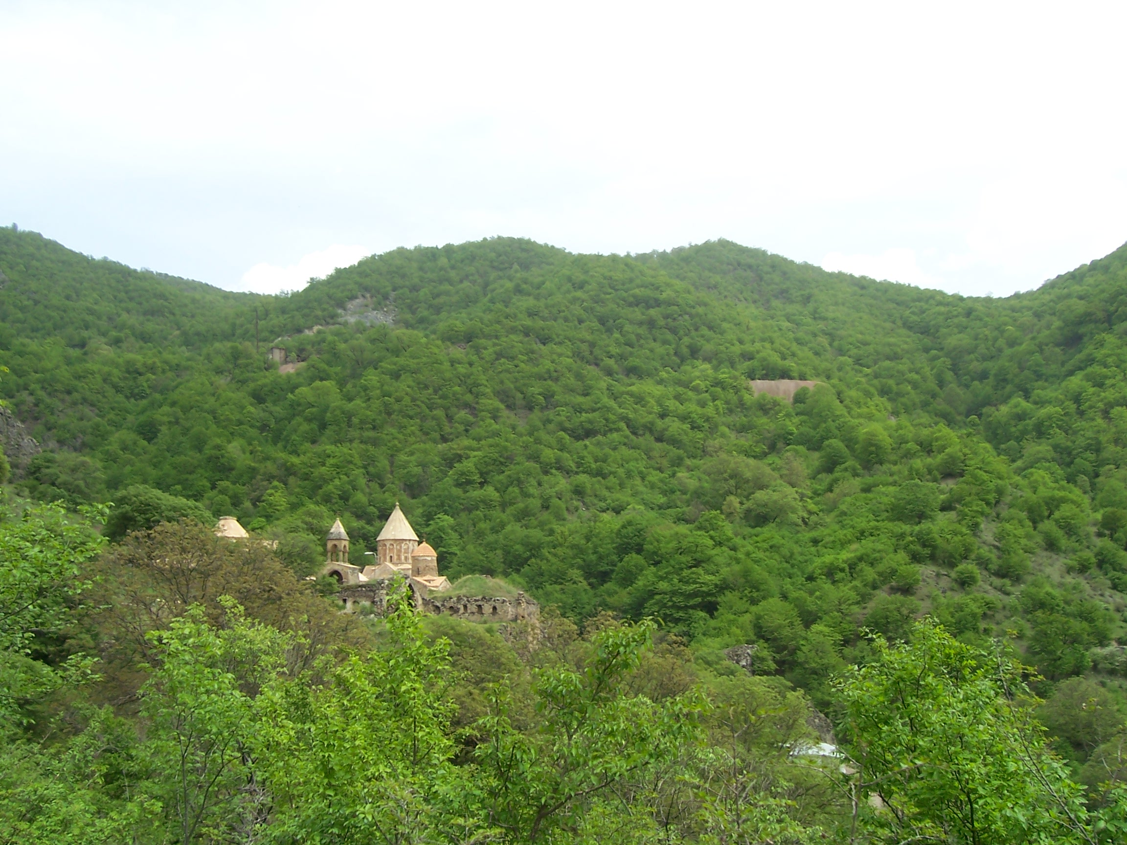 Dadivank Monastery (Khutavank)